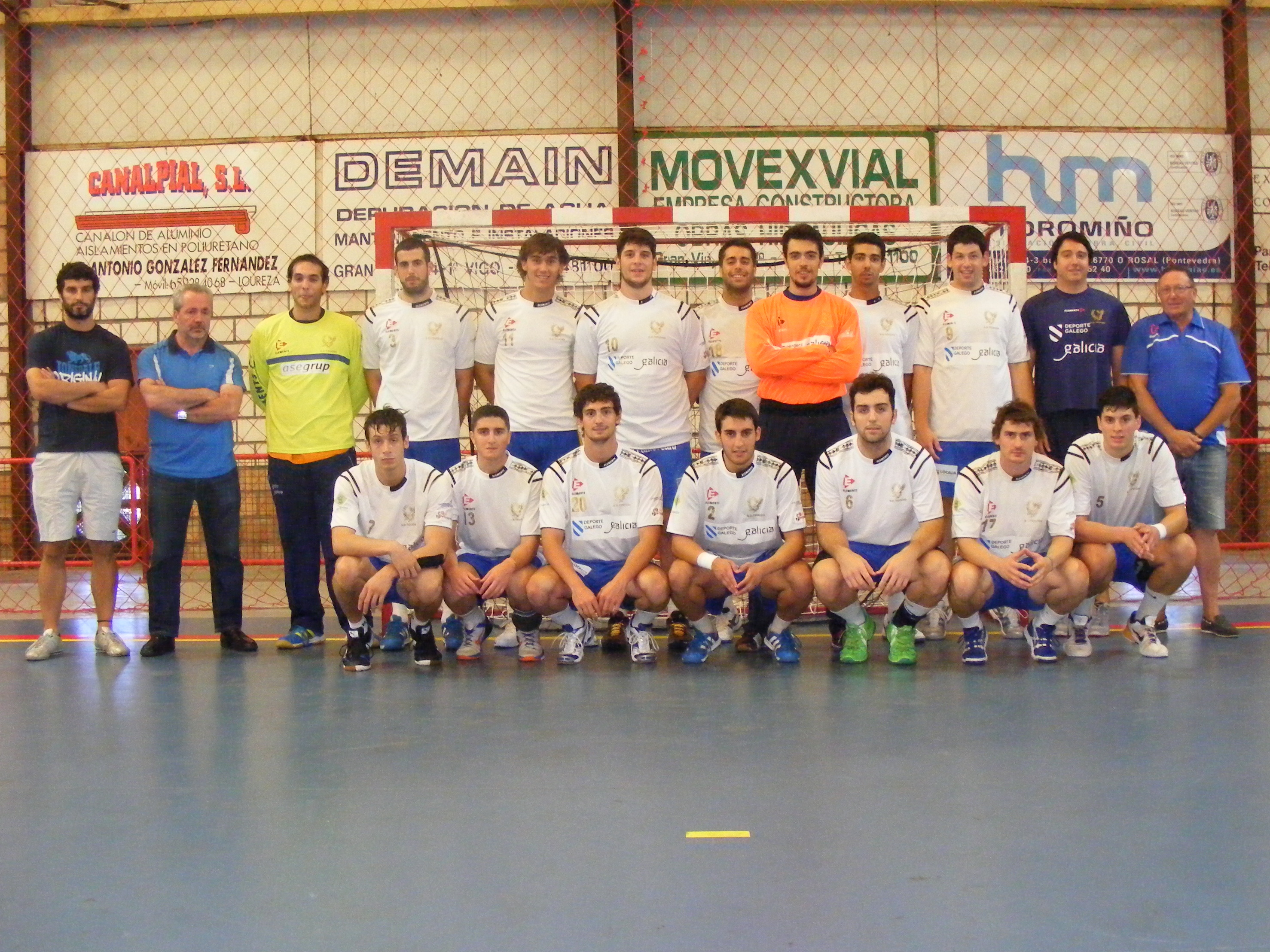 SD Teucro en la Copa Galicia 2013